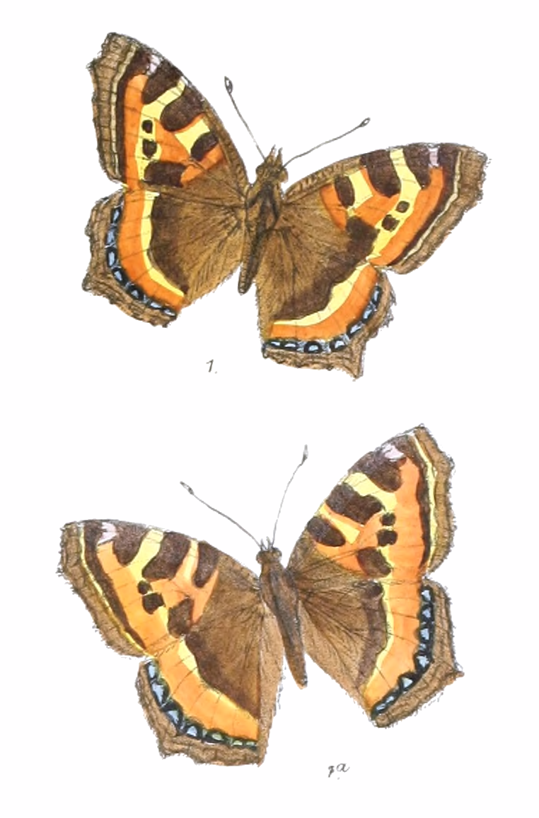 Aglais rizana